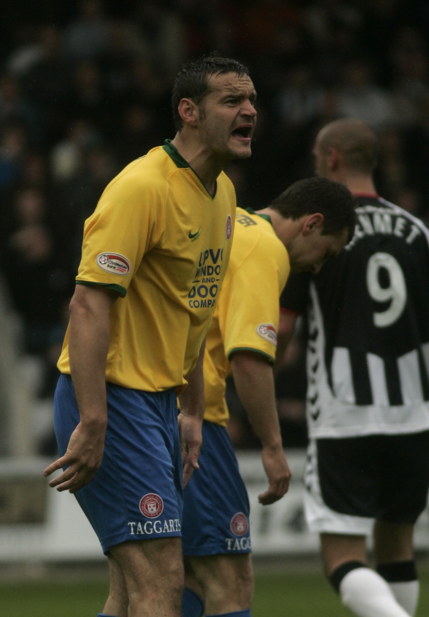 _I7Y7628